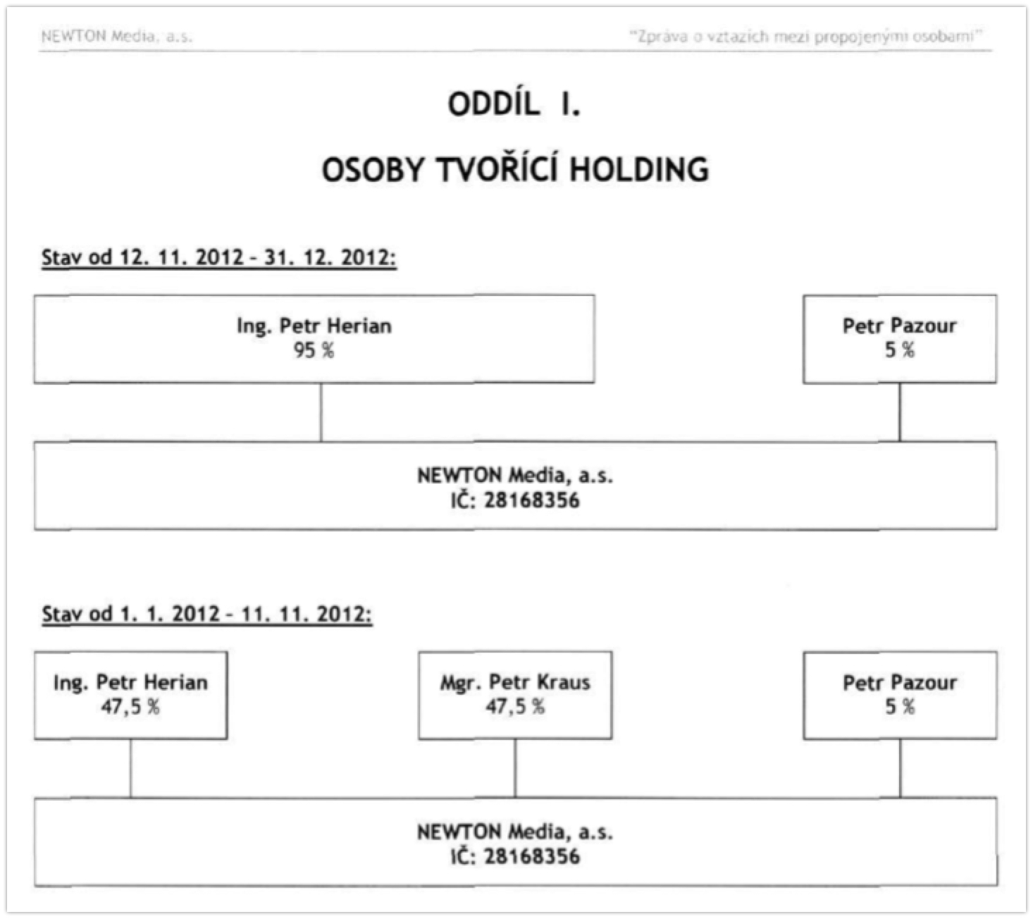 Struktura vlastníků společnosti Newton Media a.s. - zdroj: 2012 - Výroční zpráva - NEWTON Media (stránka 27 z 32)